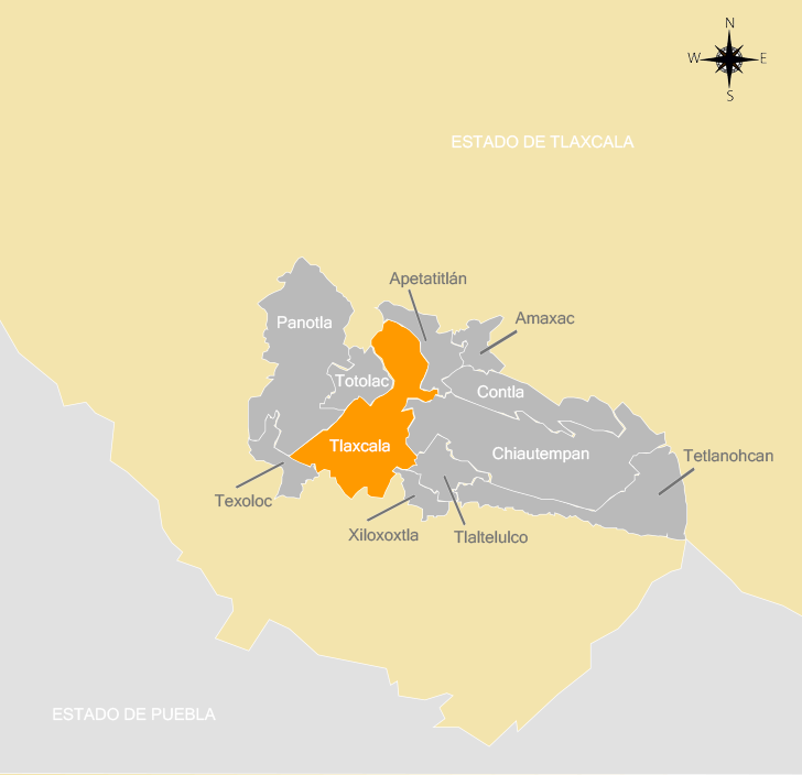 Zona conurbaada de la ciudad de Tlaxcal